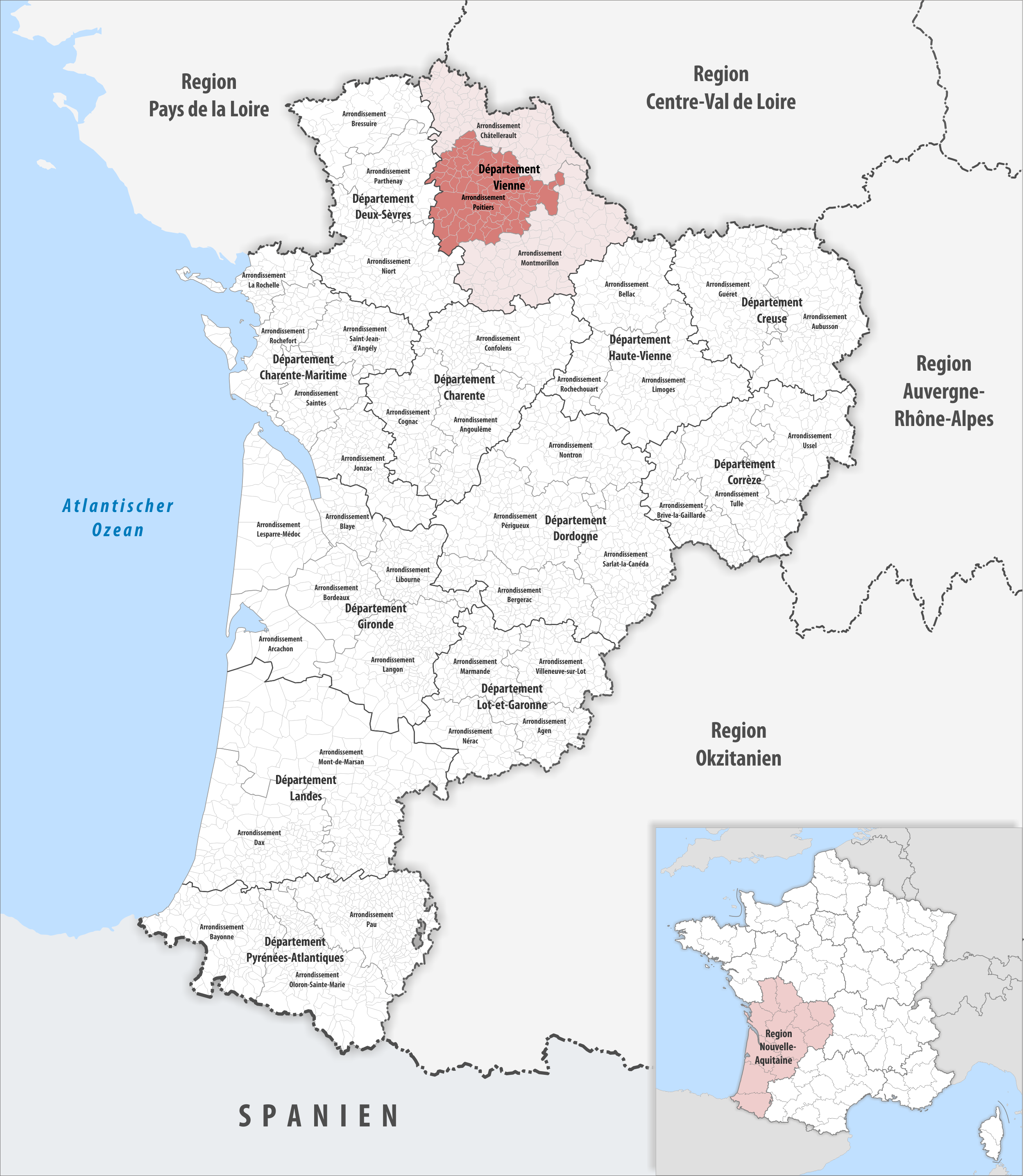 Lage des Arrondissements Poitiers